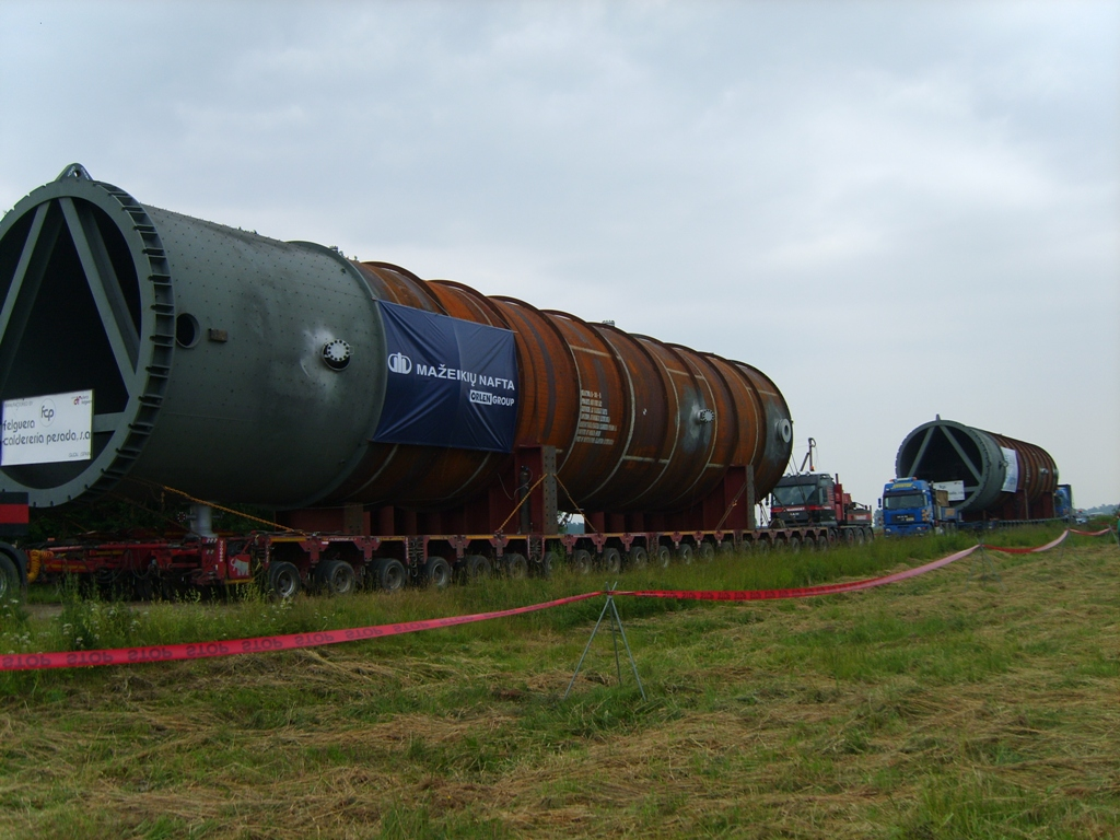 Žemaitėška: Do naujė rekordėne dīde reaktorē keliaun i Mažėikiū Naft tėis Žėdėkāss 2008 m. bėrželė 20 d..